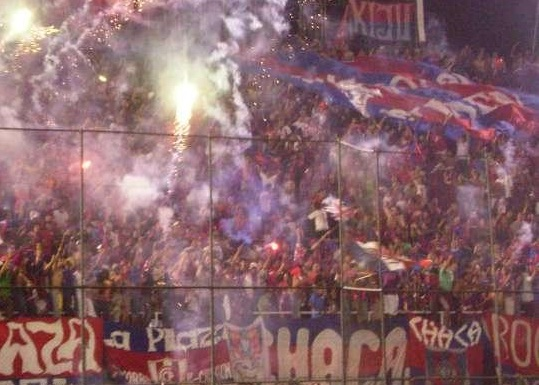 La barra con mas aguante del Paraguay